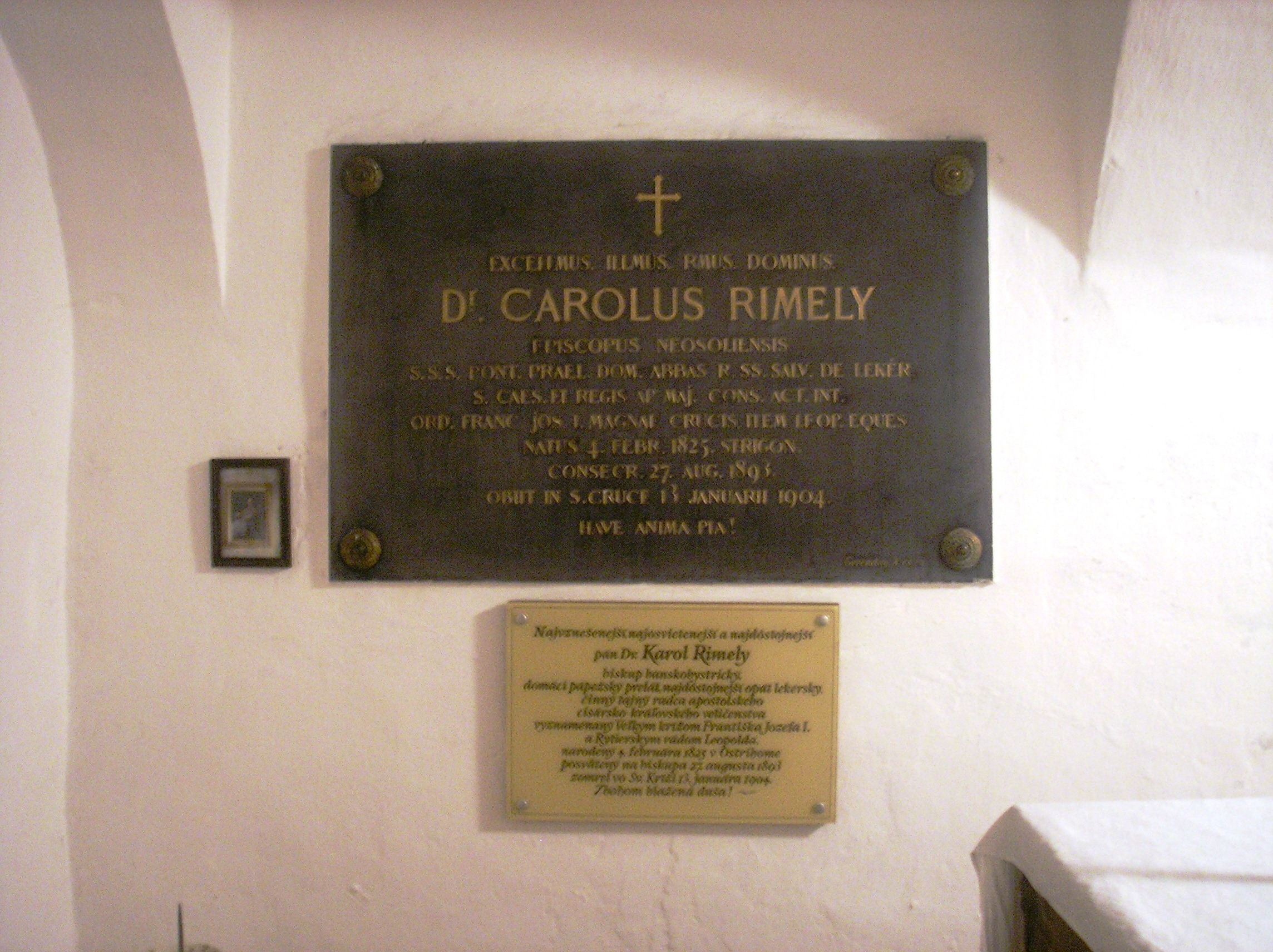 Bischofsgruft in der Kirche der Kreuzerhöhung in Heiligenkreuz an der Gran (slow. Ziar nah Hronom)